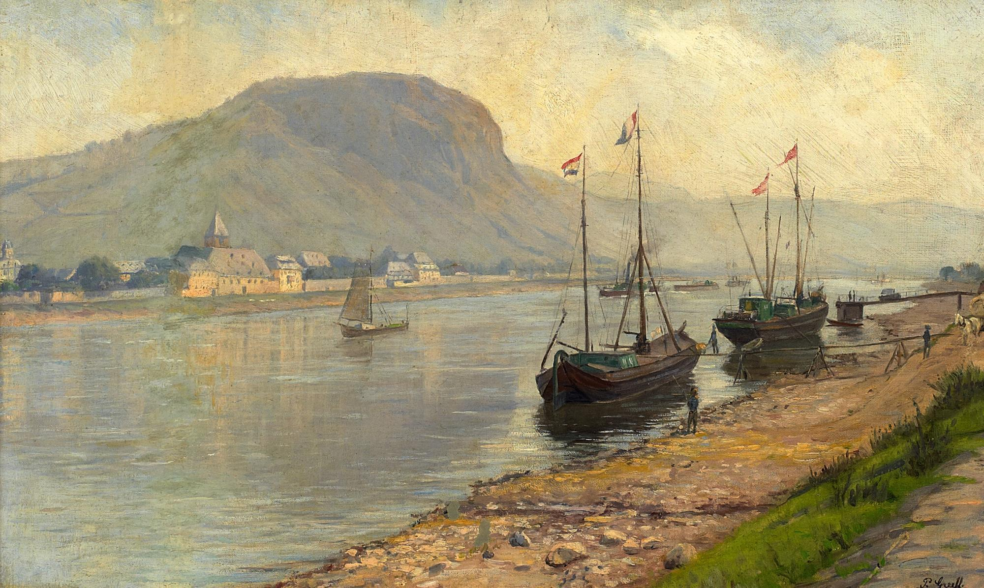 Die Erpeler Ley